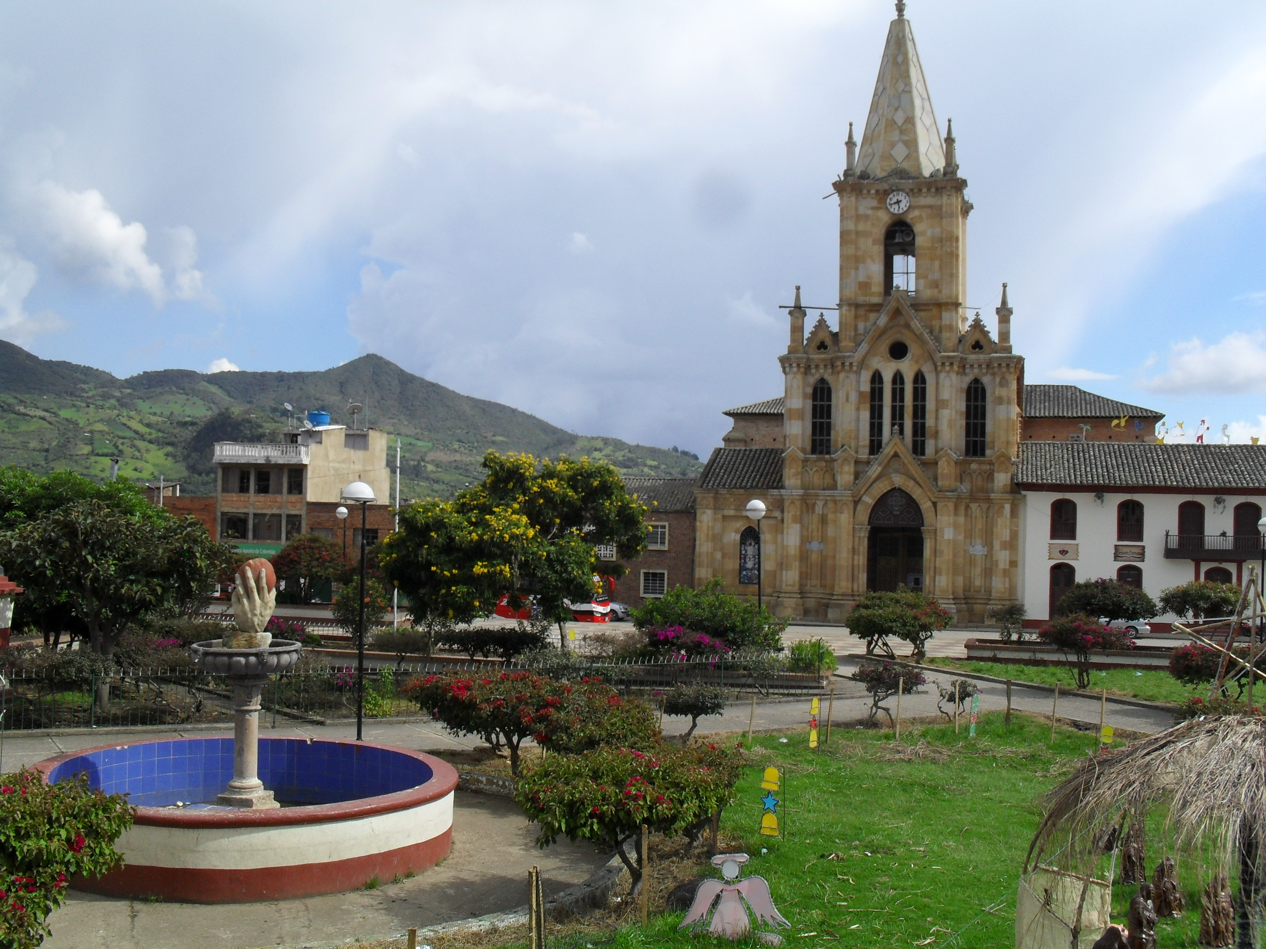 Parque principal en el municipio de Nuevo Colón, Boyacá, Colombia